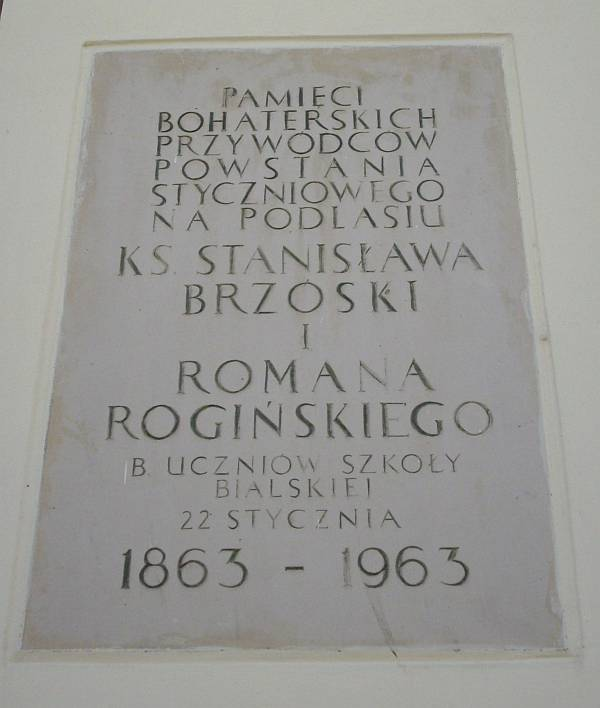 Беларуская (тарашкевіца): Памятная таблічка.